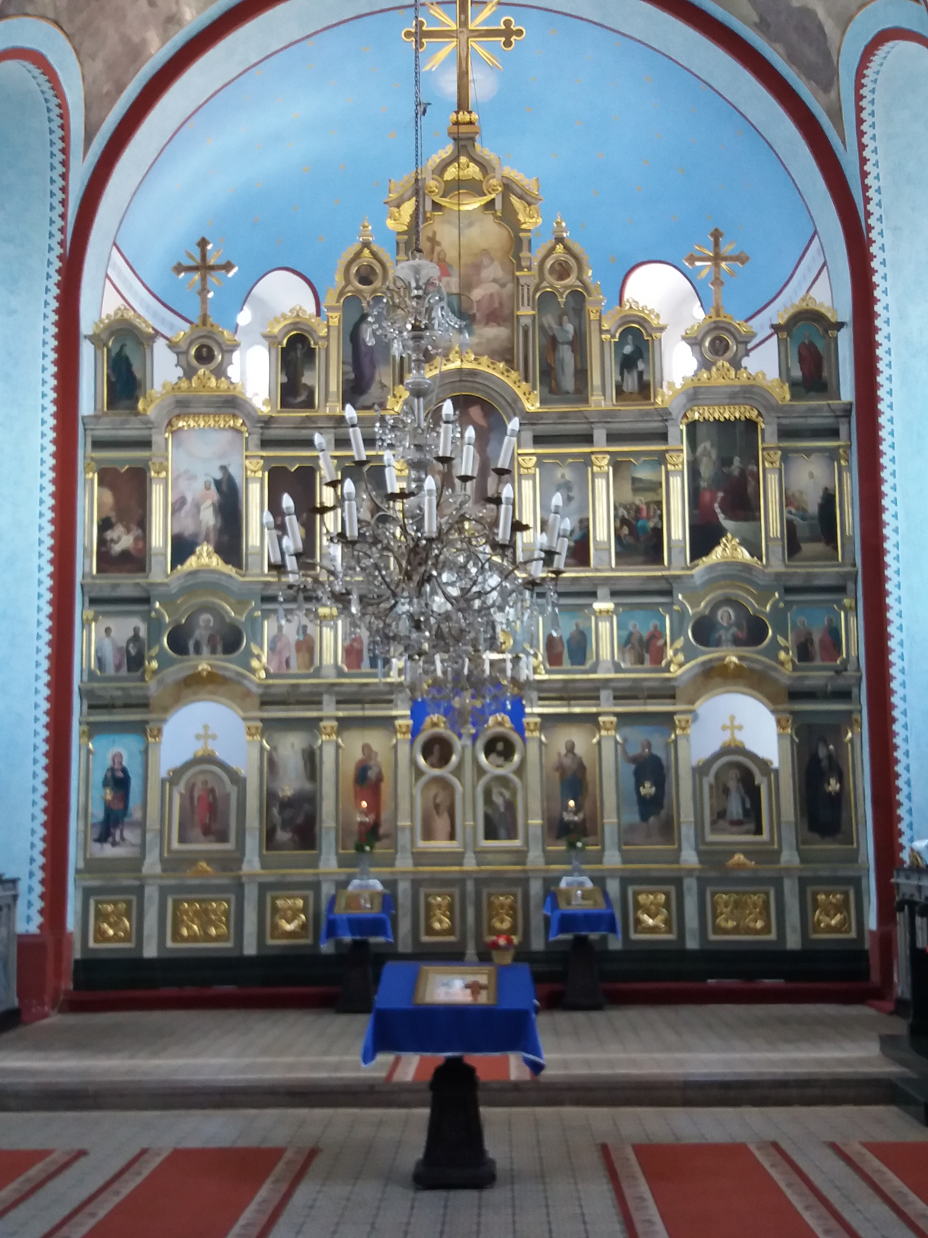 Srpski (latinica): Crkva Svetog Preobraženja, Smederevska Palanka